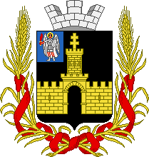 Герб міста Сквира проекту Б.Кене